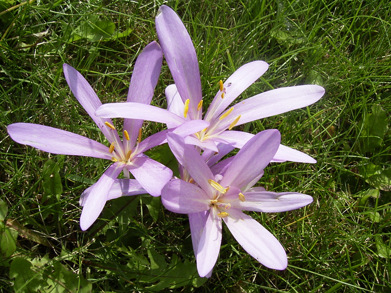 Colchicum autumnale Ziemowit